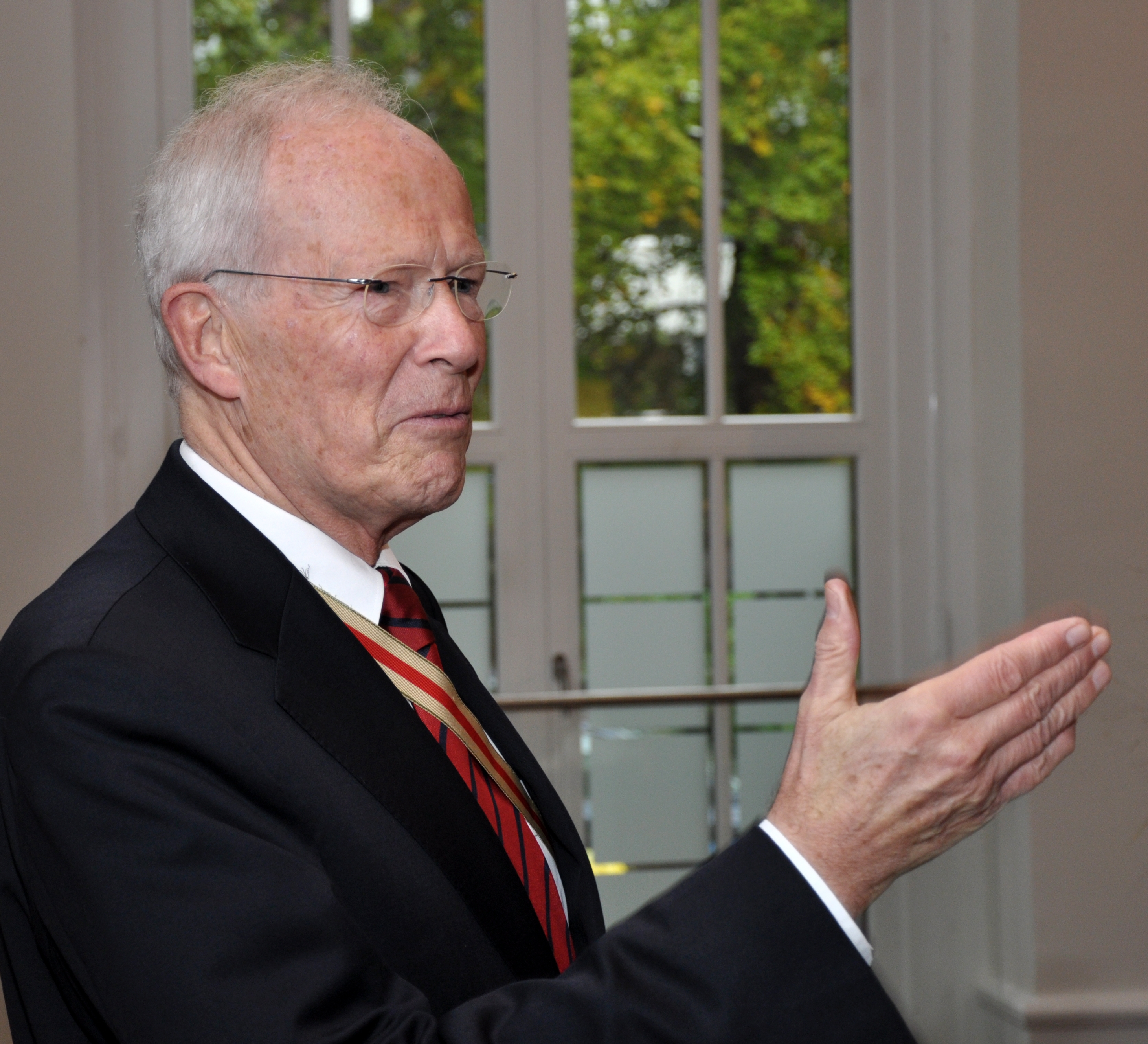 Der Rechtswissenschaftler Edzard Schmidt-Jortzig bei einem Vortrag zum 350-jährigen Jubiläum der Christian-Albrechts-Universität zu Kiel im Kieler Yachtclub.